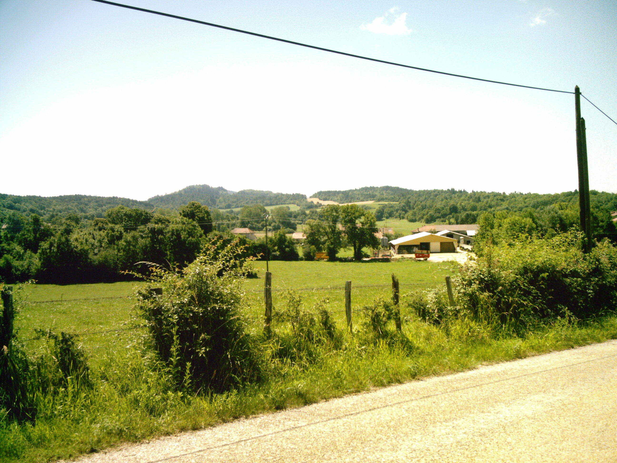 Vue d'Heyriat, hameau de Sonthonnax la montagne